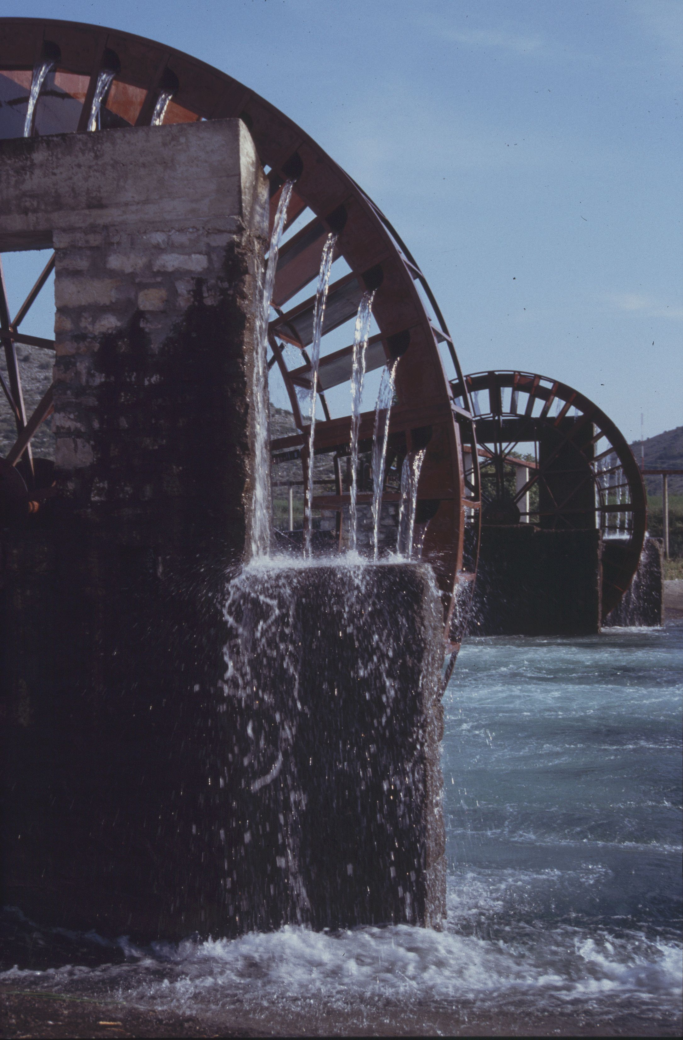 Norias bei Trebinje/Bosnien-Herzegowina